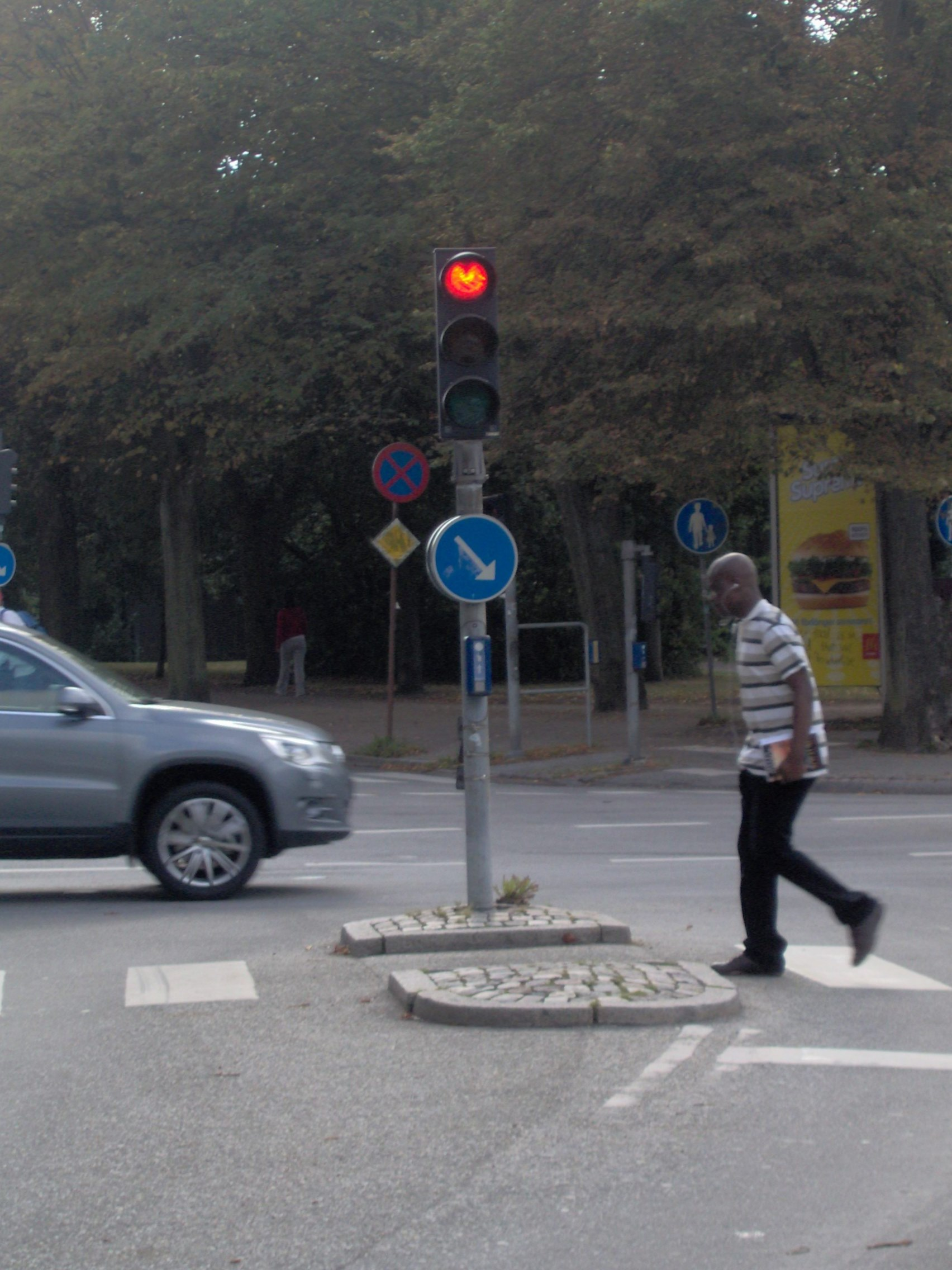 Fotografi av en refug taget från Gyllenkroks Allé ut mot Stora Södergatan i Lund.